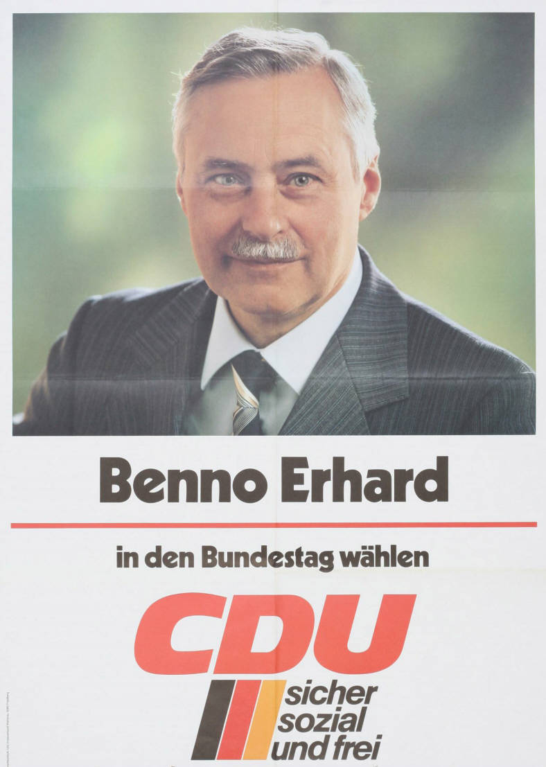 Benno Erhard in den Bundestag wählen CDU sicher sozial und frei Abbildung:PorträtfotoPlakatart:Kandidaten-/Personenplakat mit PorträtAuftraggeber:Verantw.: CDU KV Wetterau, FriedbergObjekt-Signatur:10-001: 2480Bestand:Plakate zu Bundestagswahlen (10-001)GliederungBestand10-18:Plakate zu Bundestagswahlen (10-001) » Die 9. Bundestagswahl am 5. Oktober 1980 » CDU » Mit PorträtfotoLizenz:KAS/ACDP 10-001: 2480 CC-BY-SA 3.0 DE